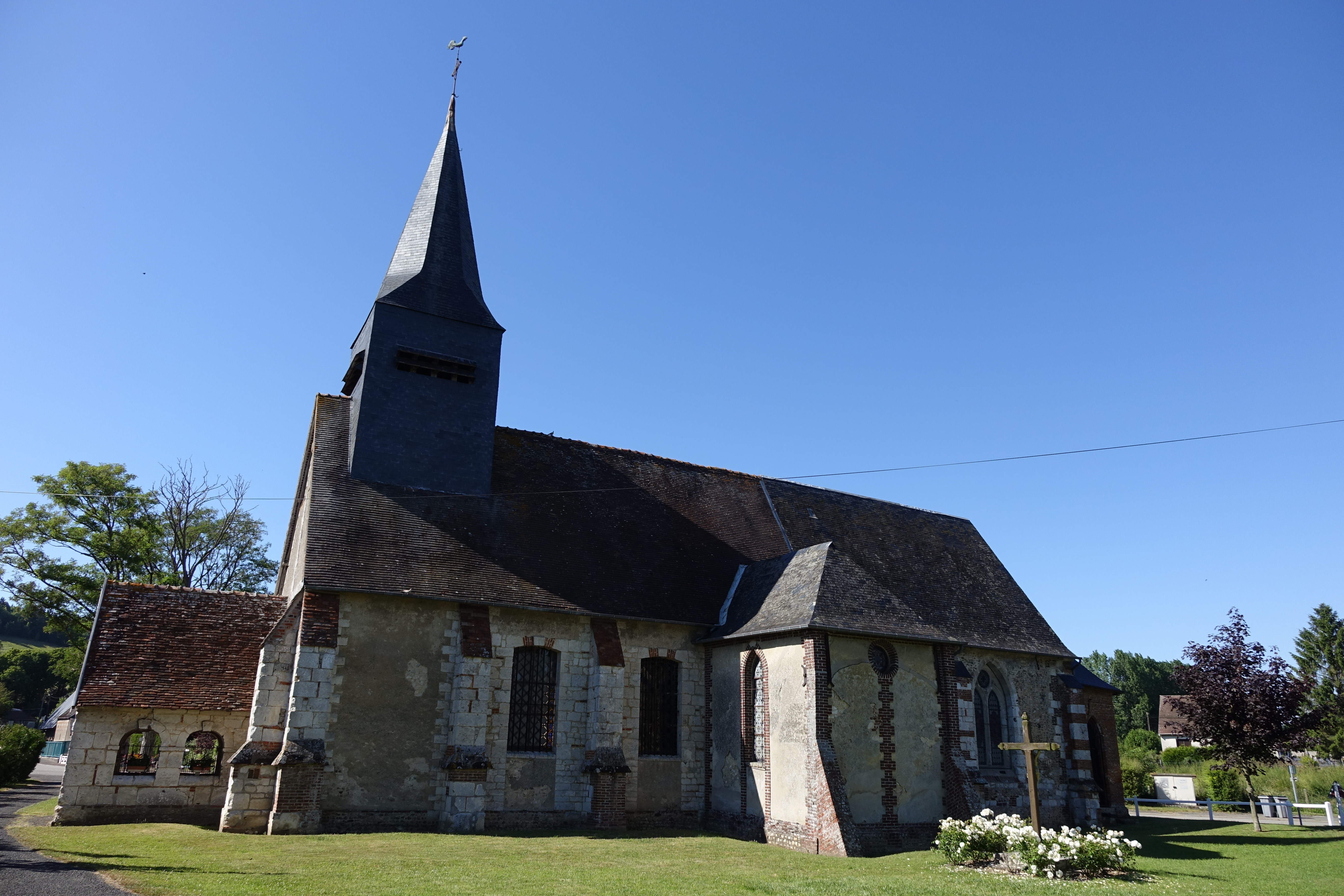 Église de Fry, Seine-Maritime, France